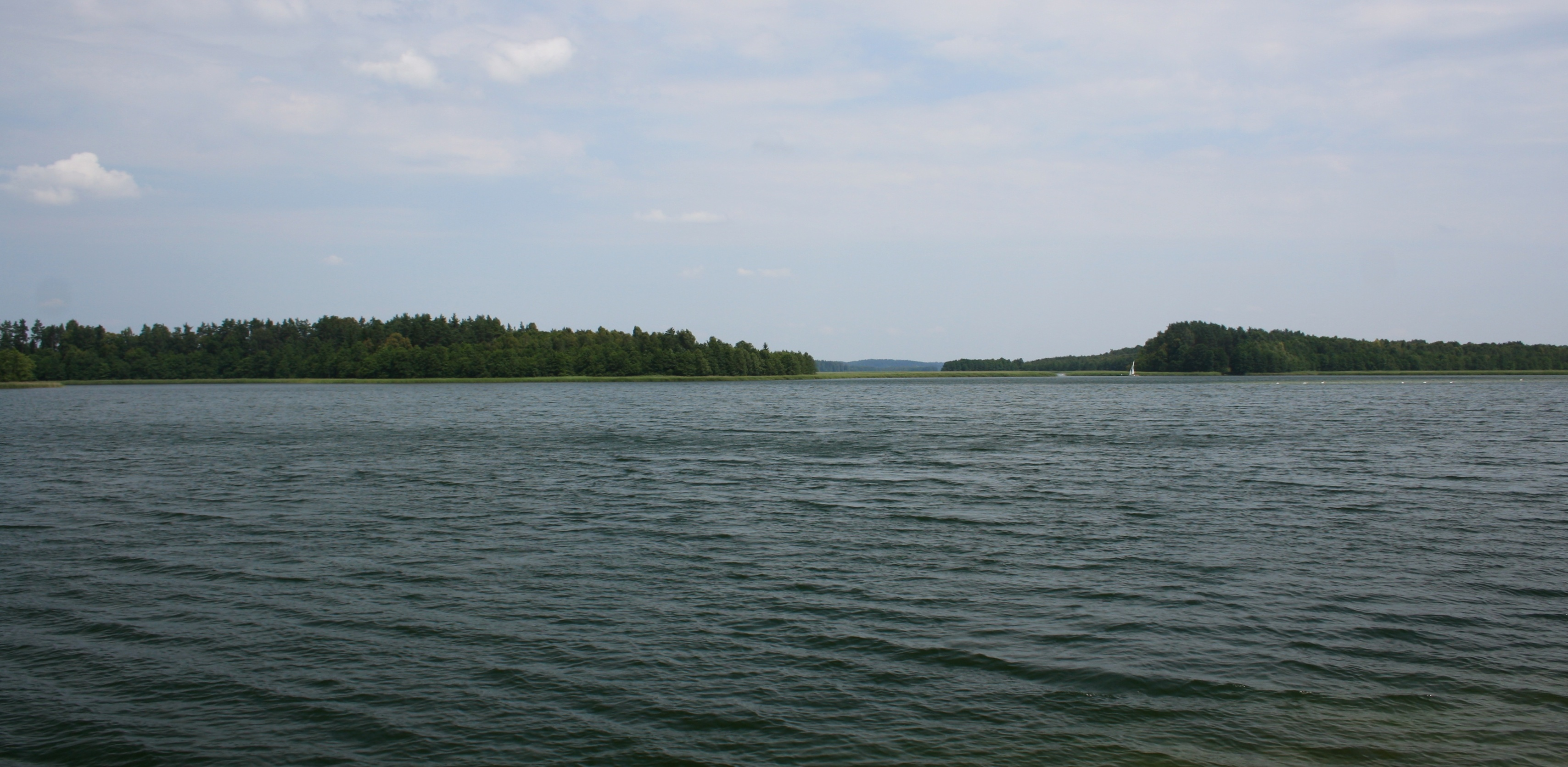 Widok na jezioro Wigry od strony południowej